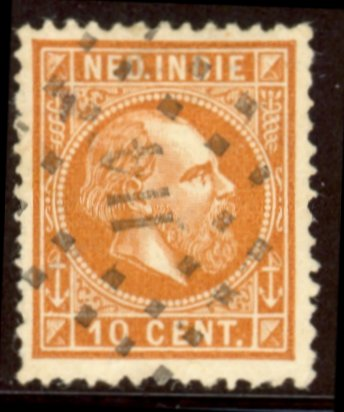 Dit is een afdruk van een puntstempel van het meest zeldzame postkantoor (nummer 114) Rantau Prapat in Sumatra. De postzegel is Nvph nr. 9, de 10 cent Koning Willem III.